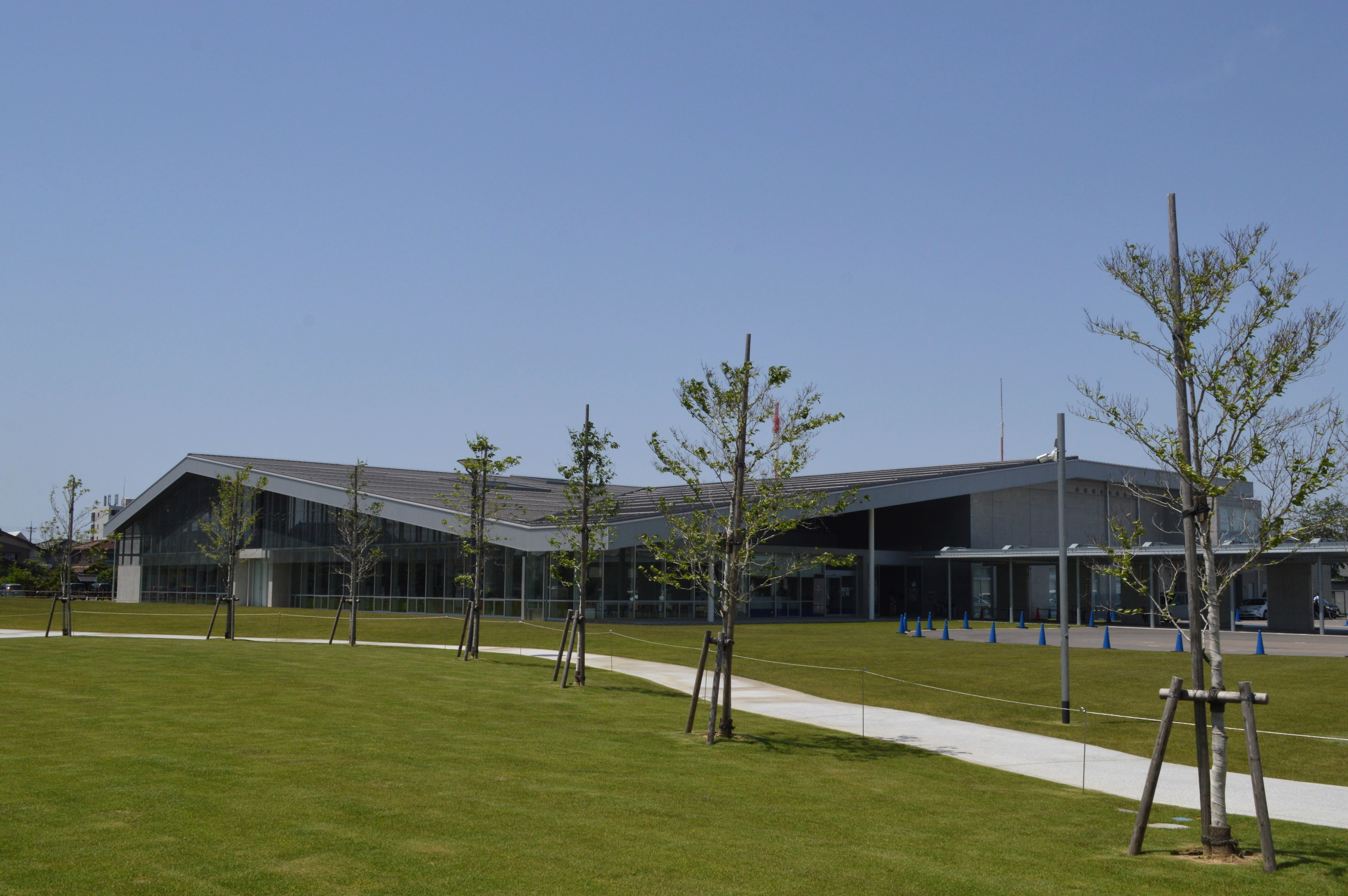 石川県野々市市の学びの杜ののいちカレード。野々市市立図書館が入っている。